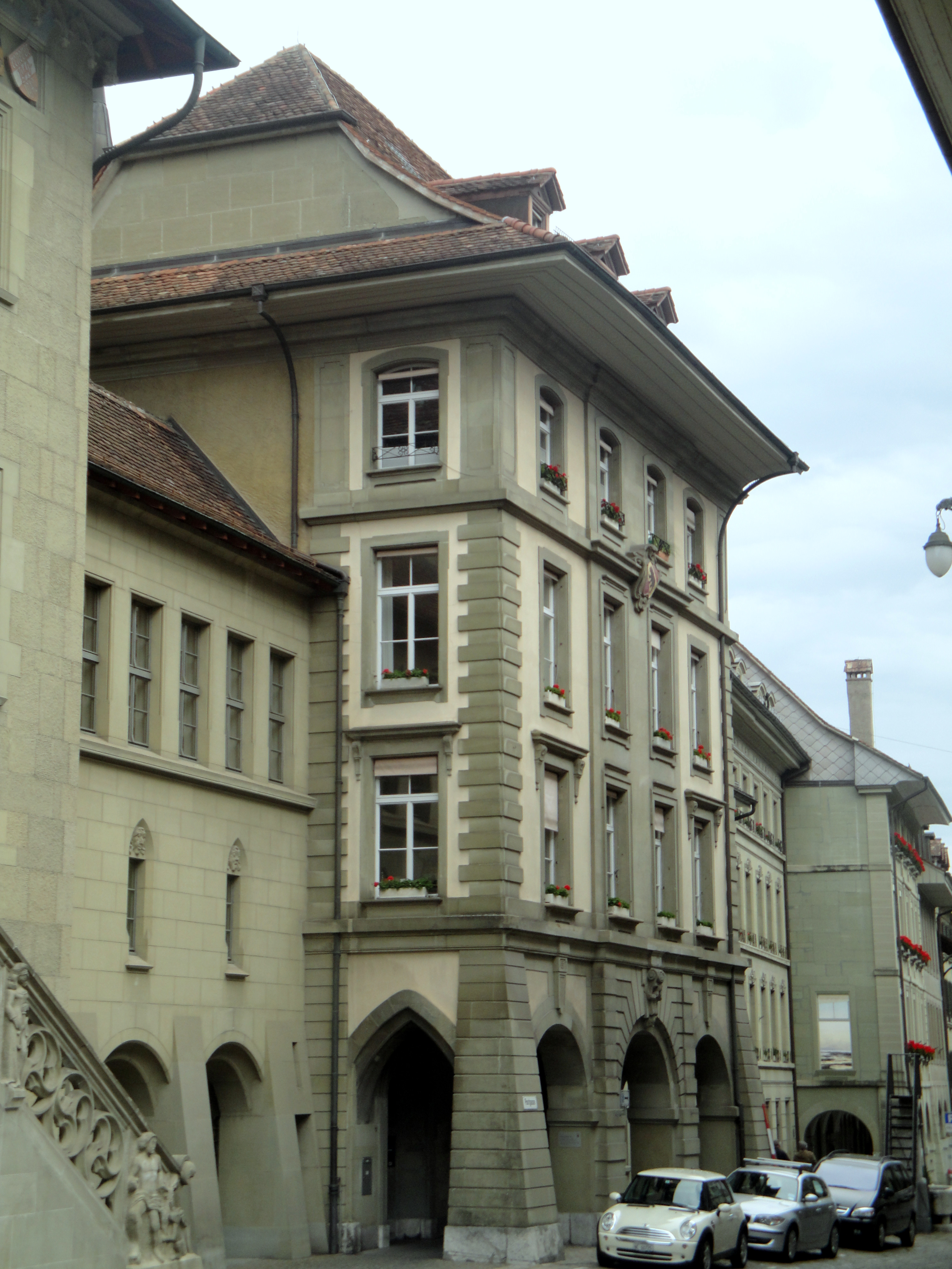 Bern, Rathaus, Durchgang östlich des Hauptgebäudes und Gebäude Postgasse 70-72, im Hintergrund die Staatskanzlei (Postgasse 68)